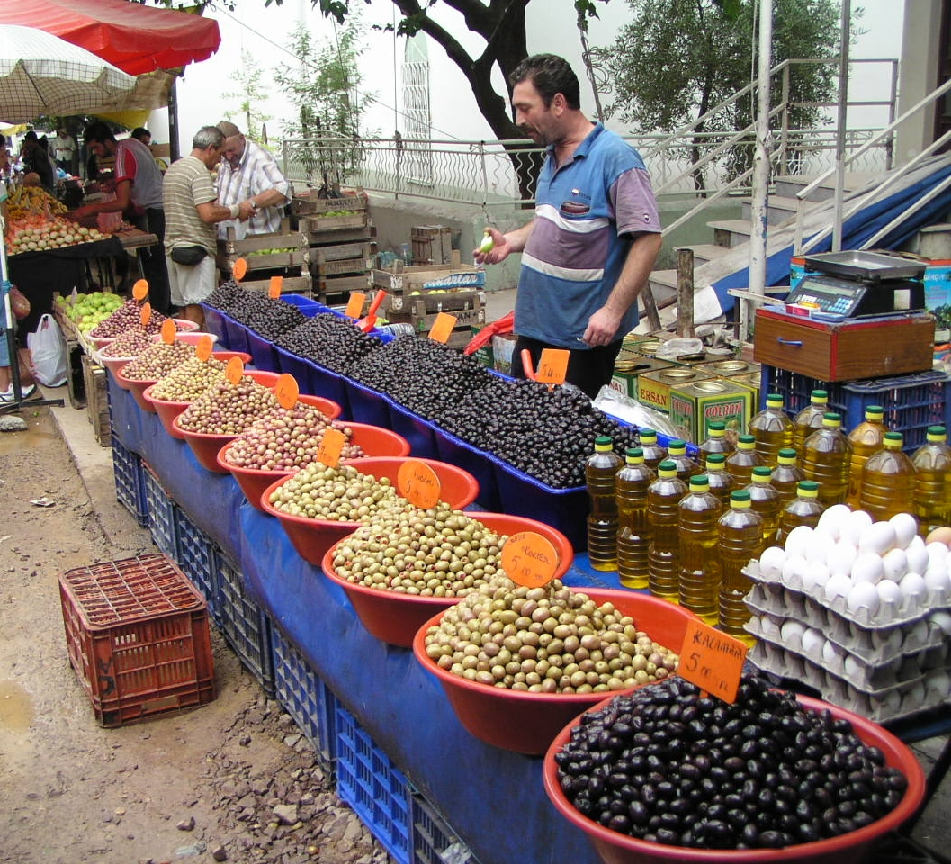 Olivenhändler in Degirmendere, Kocaeli.